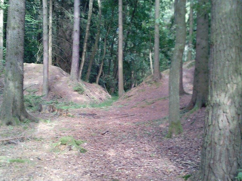 Protržená hráz rybníka